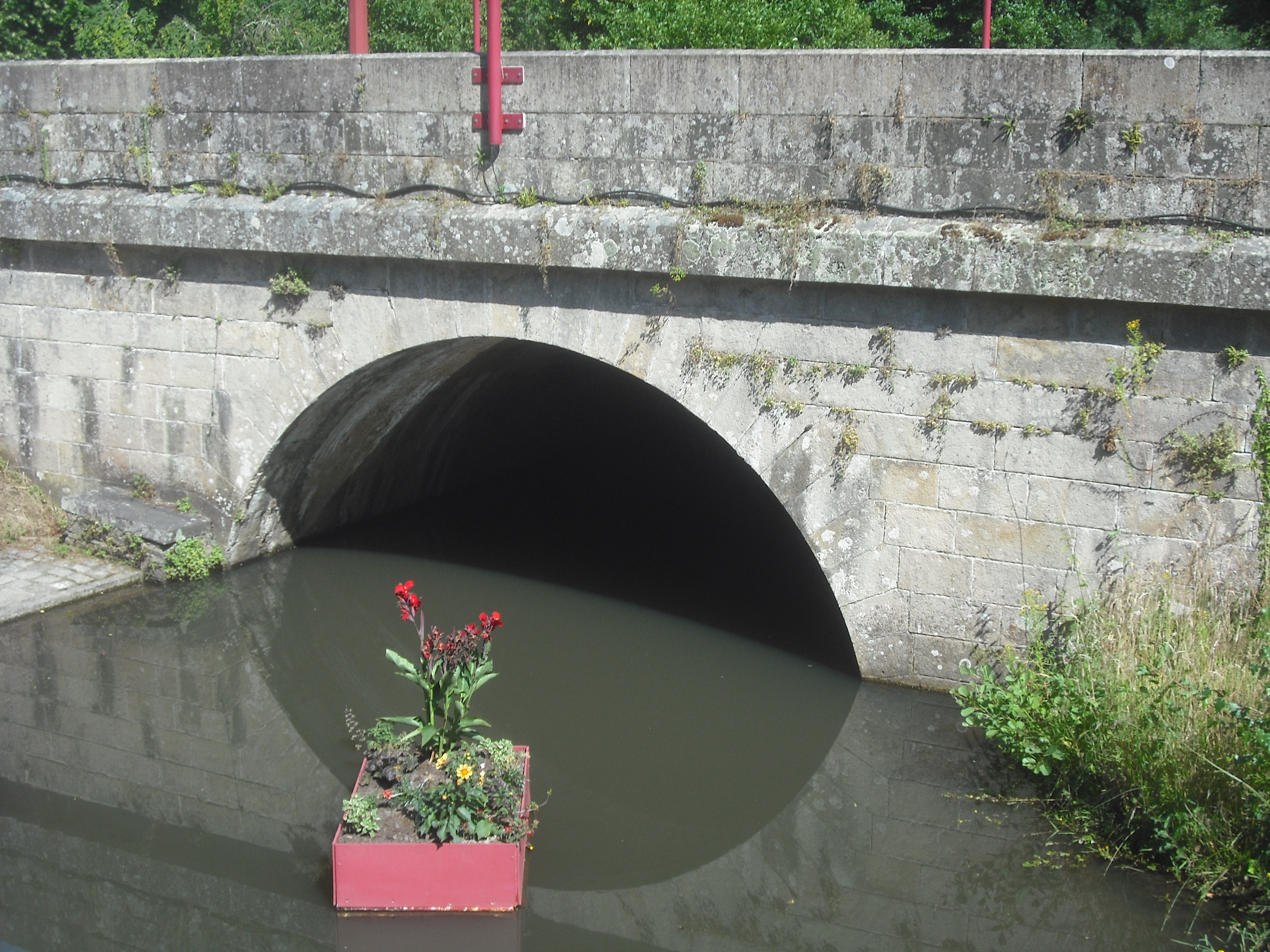 Pont de Beaulieu, Candé, Maine-et-Loire, France.